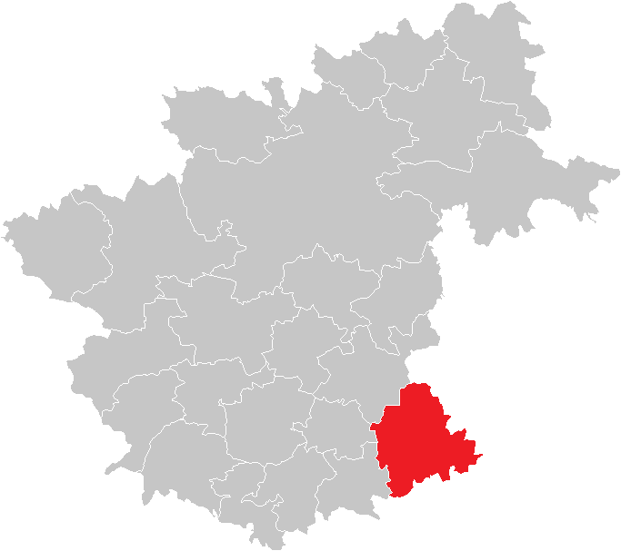 Bezirk Zwettl